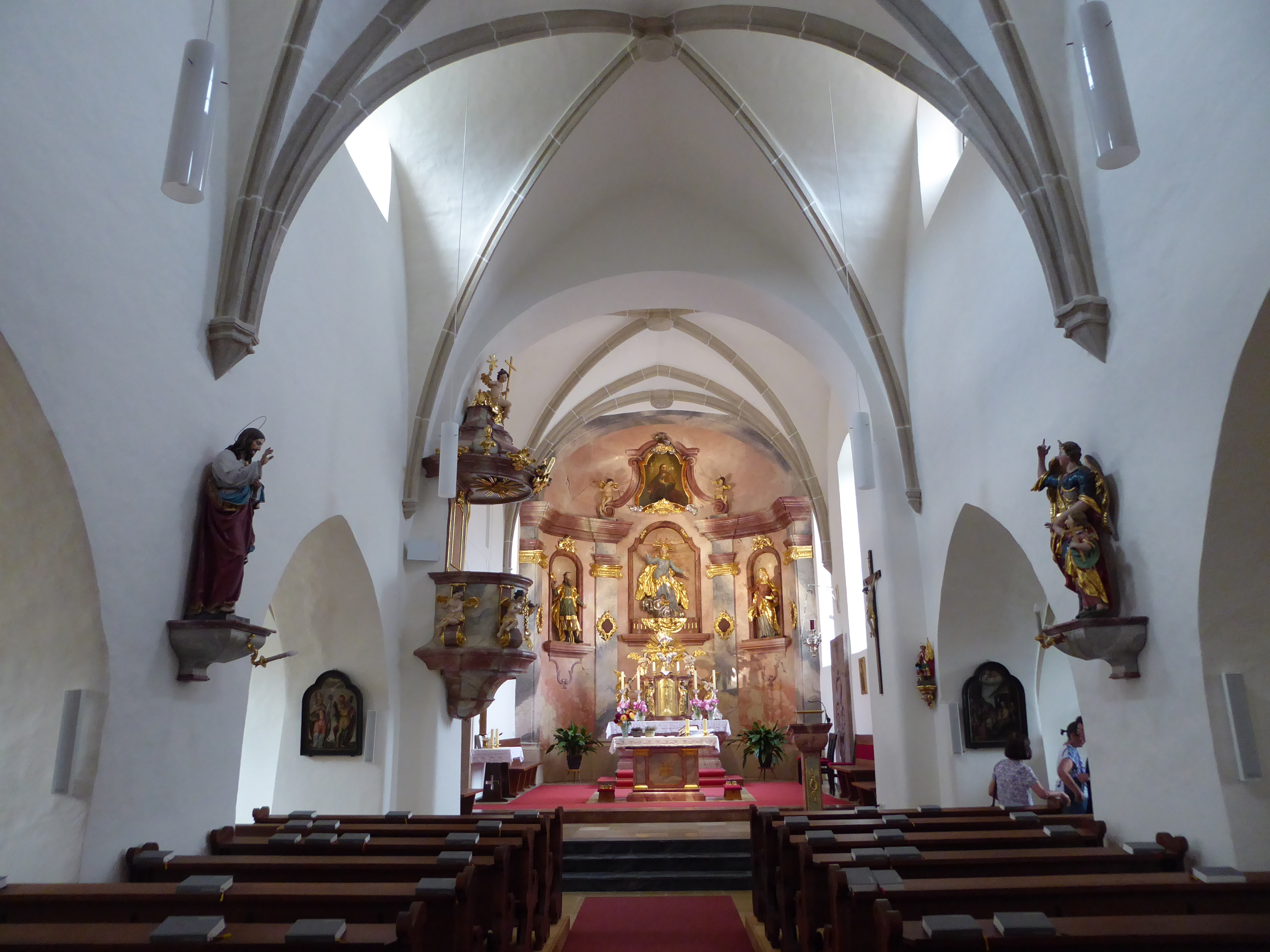 Pfarrkirche, Aggsbach Markt, Niederösterreich - Hochaltar mit Statuen hll. Maria, Joachim und Anna, Oberbild hl. Josef